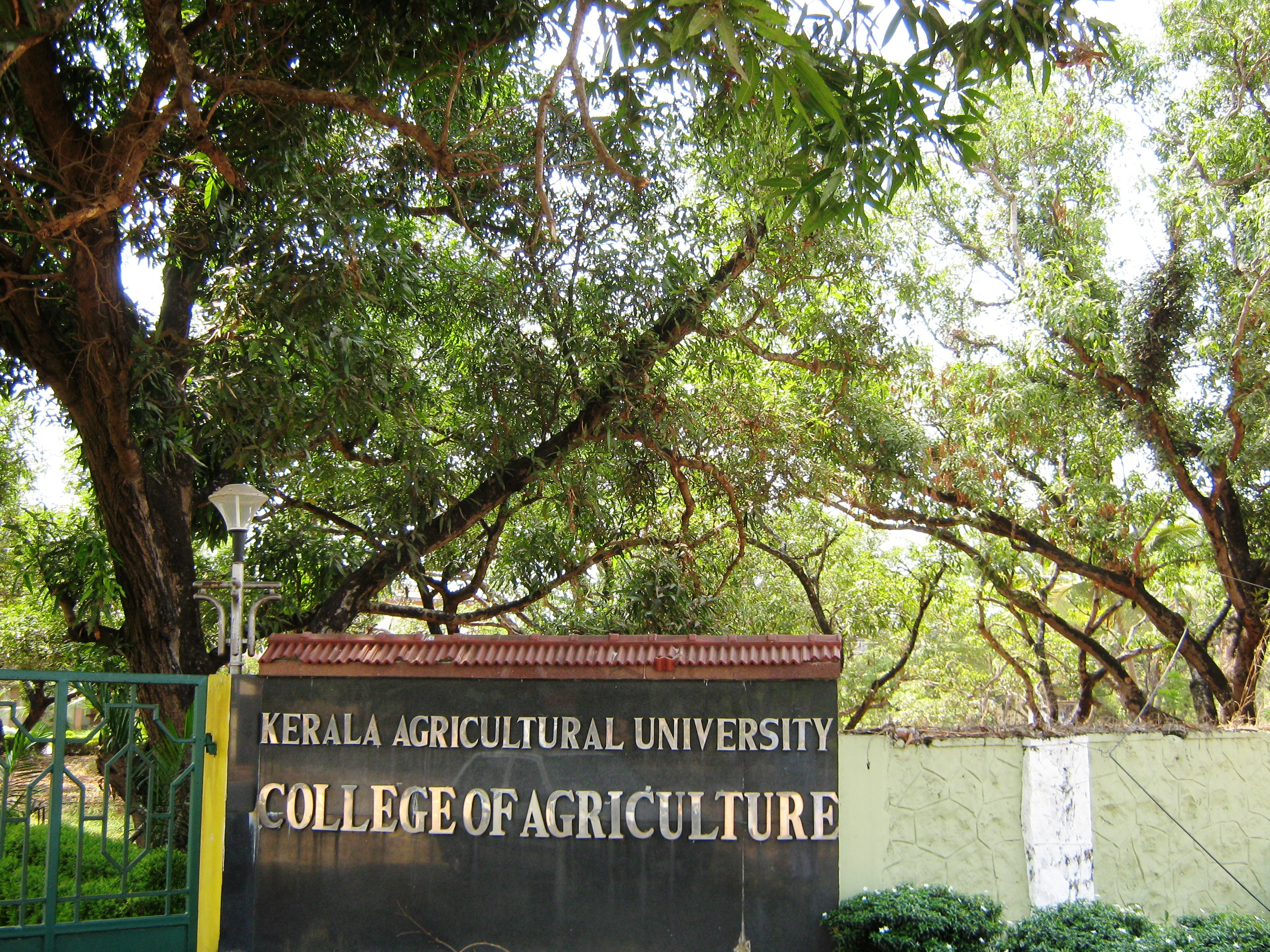 Kasargod, Kerala, India.